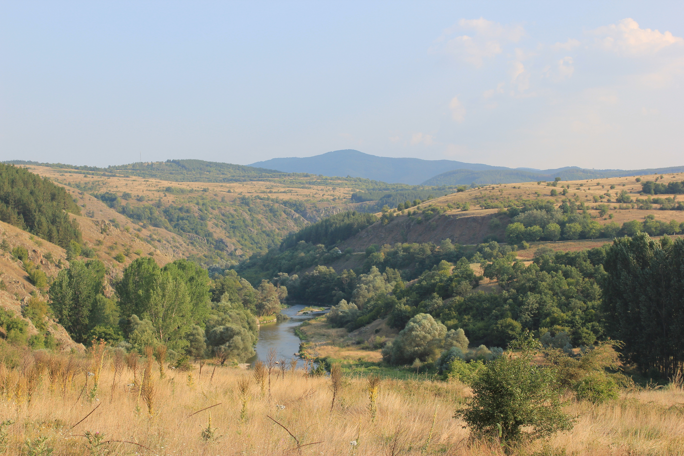 Hornjoserbsce: Rěka Struma mjez Kjustendilom a Dupnicu w Bołharskej.